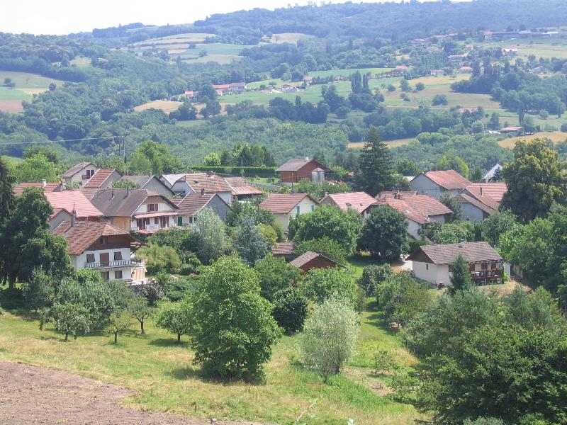 Le village de Bassy en Haute-Savoie